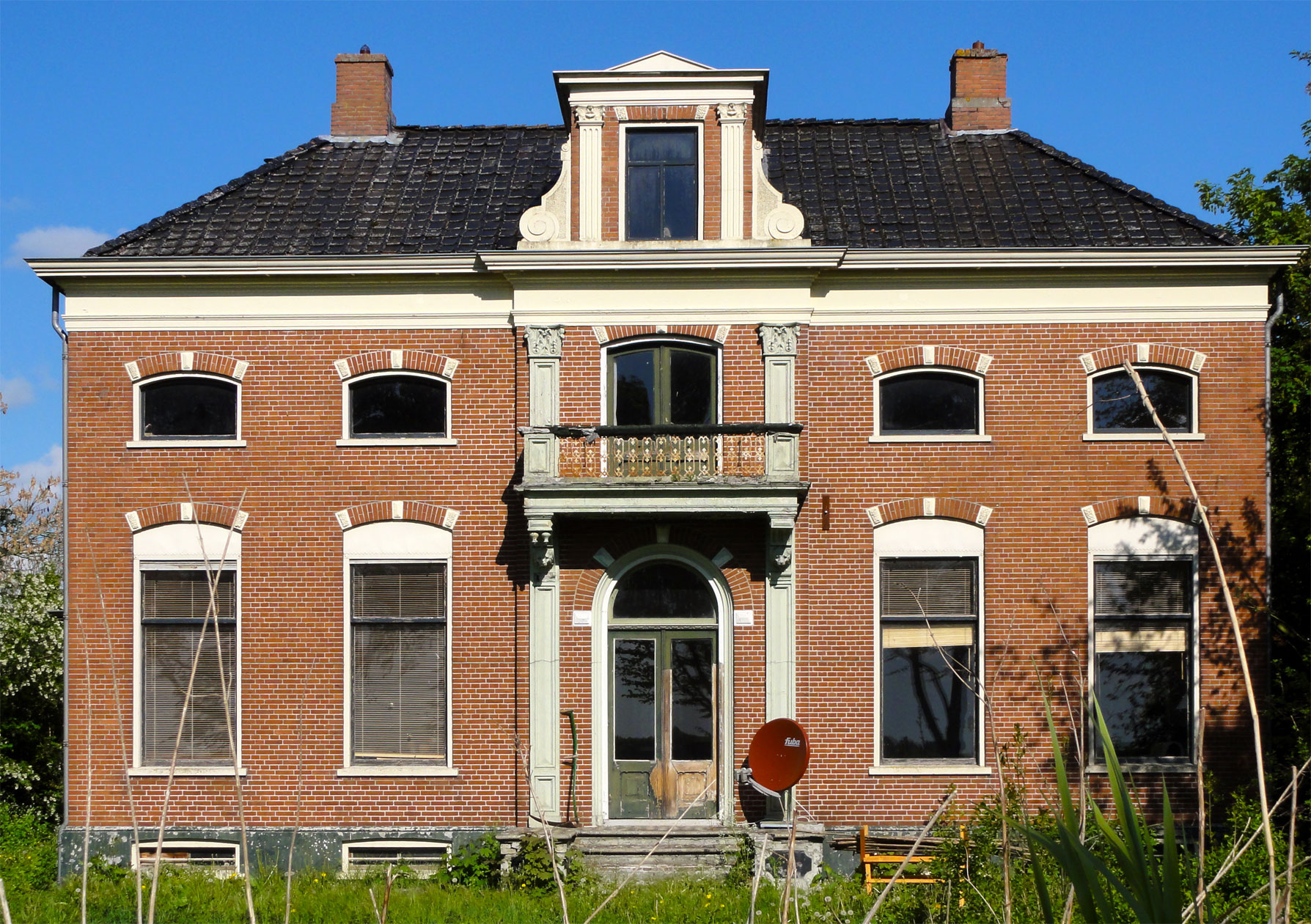 Dwarshuisboerderij Hoofdweg 103 Nieuw-Beerta